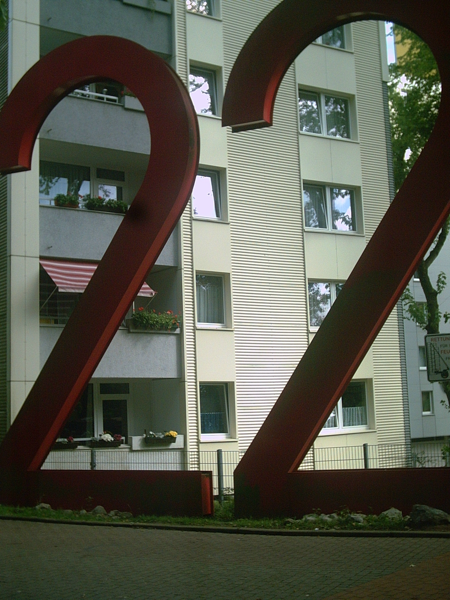 Diese Hausnummern „22“ sind 8 Meter hoch